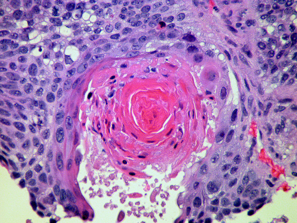 Squamous cell carcinoma